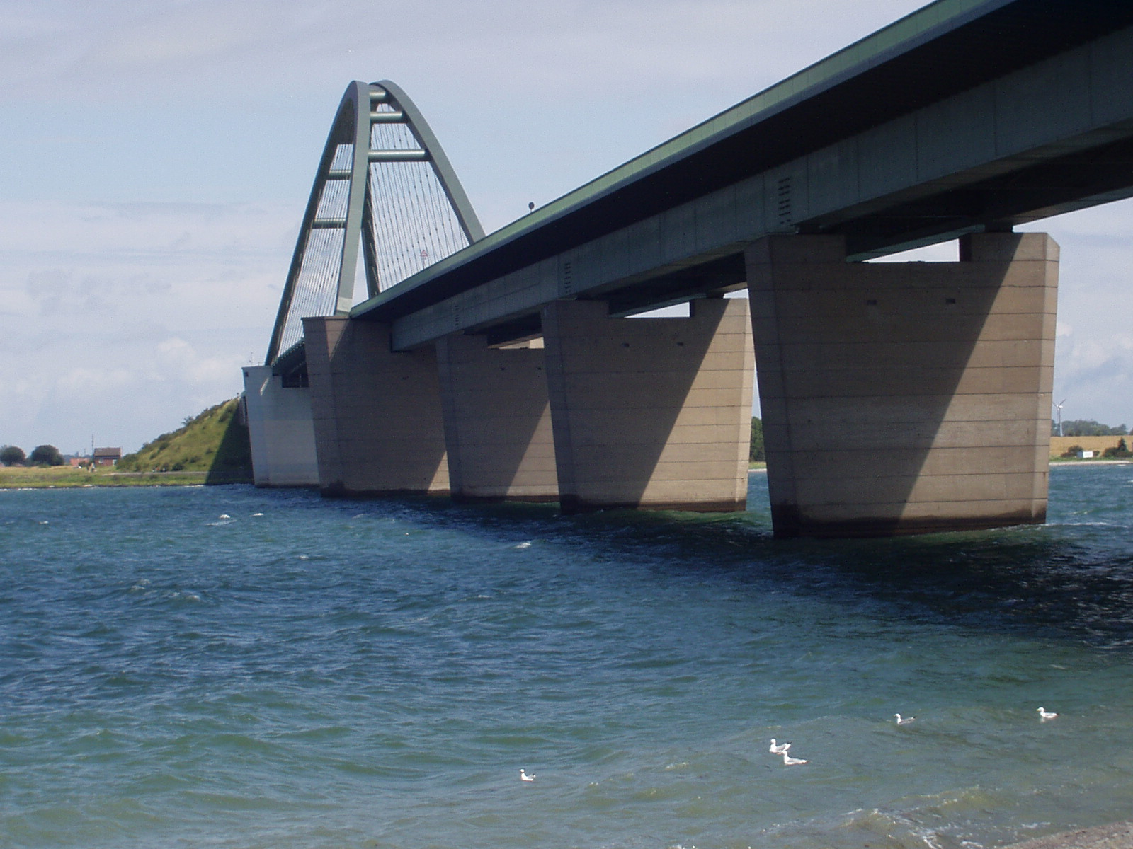 Brücke auf die Ostseeinsel Fehmarn in Schleswig-Holstein